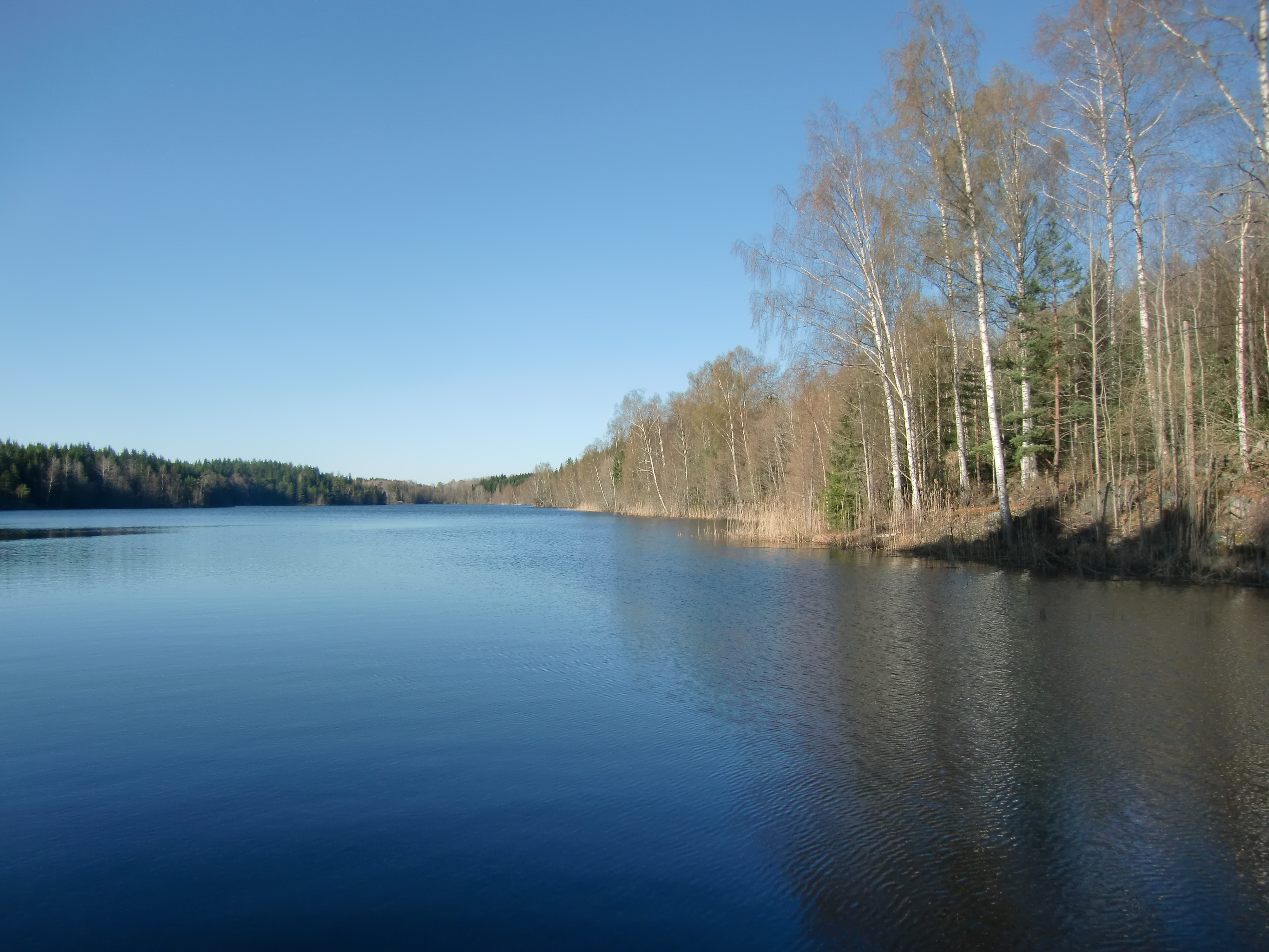 En sommarbild